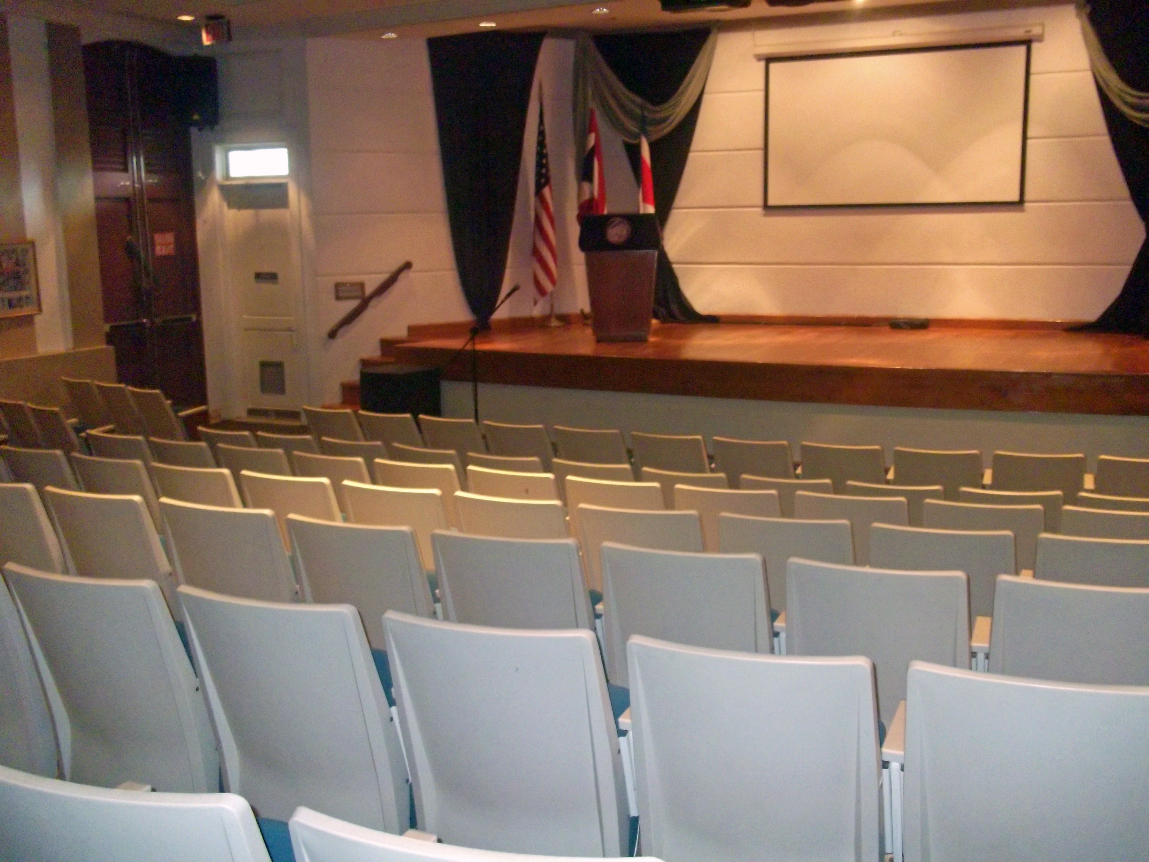 Anfiteatro Salvador Brau.